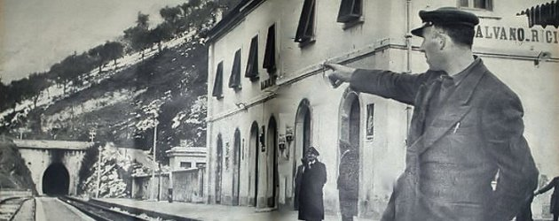 La stazione di Balvano-Ricigliano (Potenza), ultima fermata del treno prima del disastro ferroviario del 3 marzo 1944 nella galleria delle Armi